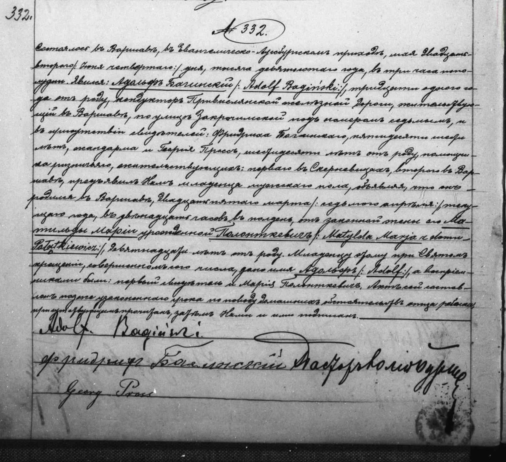 Akt urodzenia Adolfa Bagińskiego